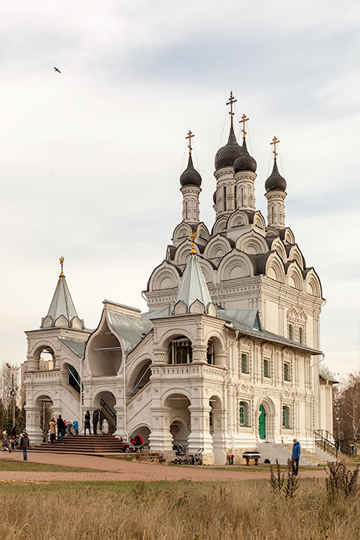 Церковь Благовещения Пресвятой Богородицы